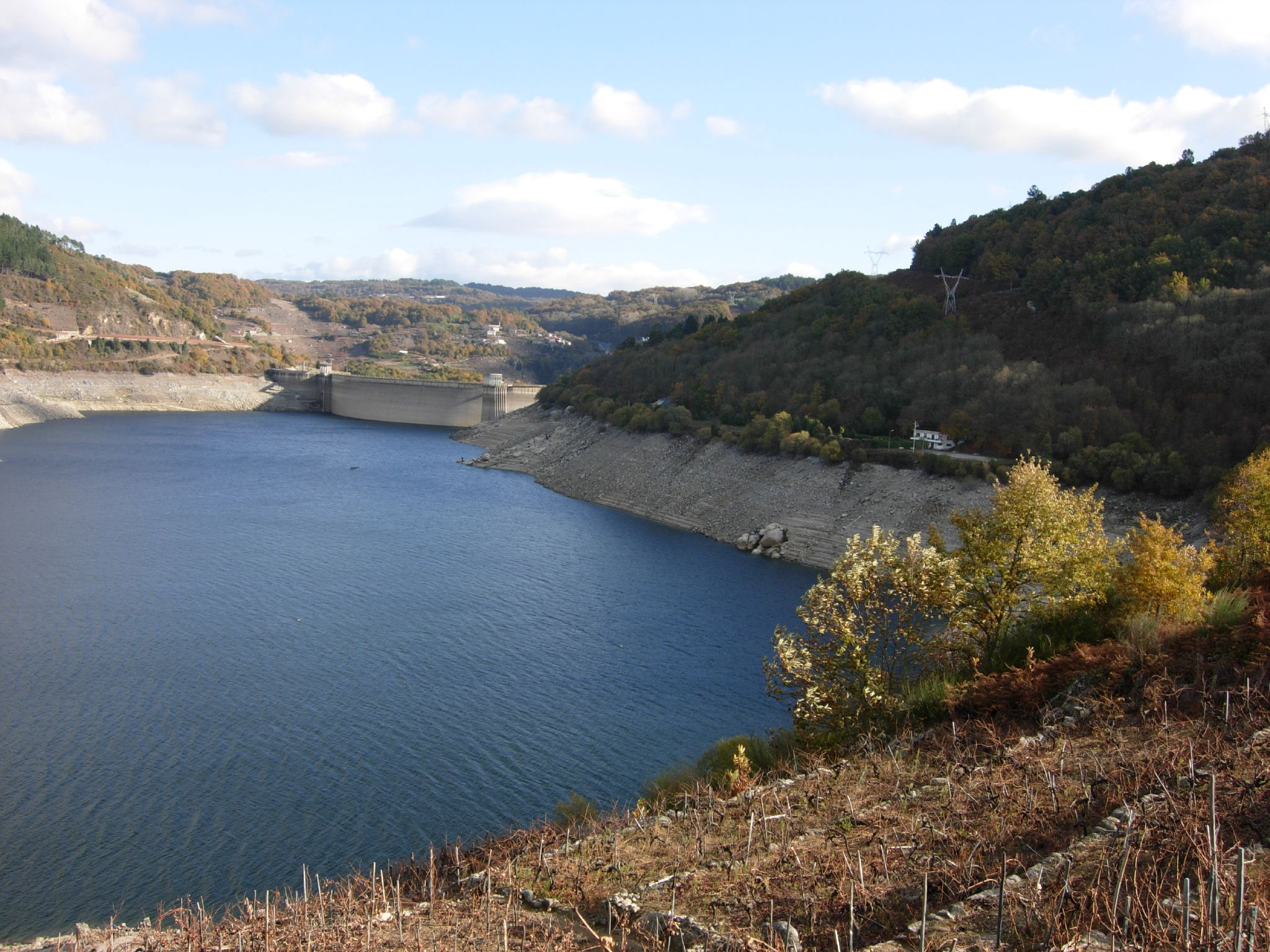 Este es el nivel del agua en el embalse de Belesar. Años atrás, en estas mismas fechas el nivel estaba en su cota más alta. Es tiempo de podar las viñas, pero no se puede porque a las viñas todavía no le han caido todas sus hojas.